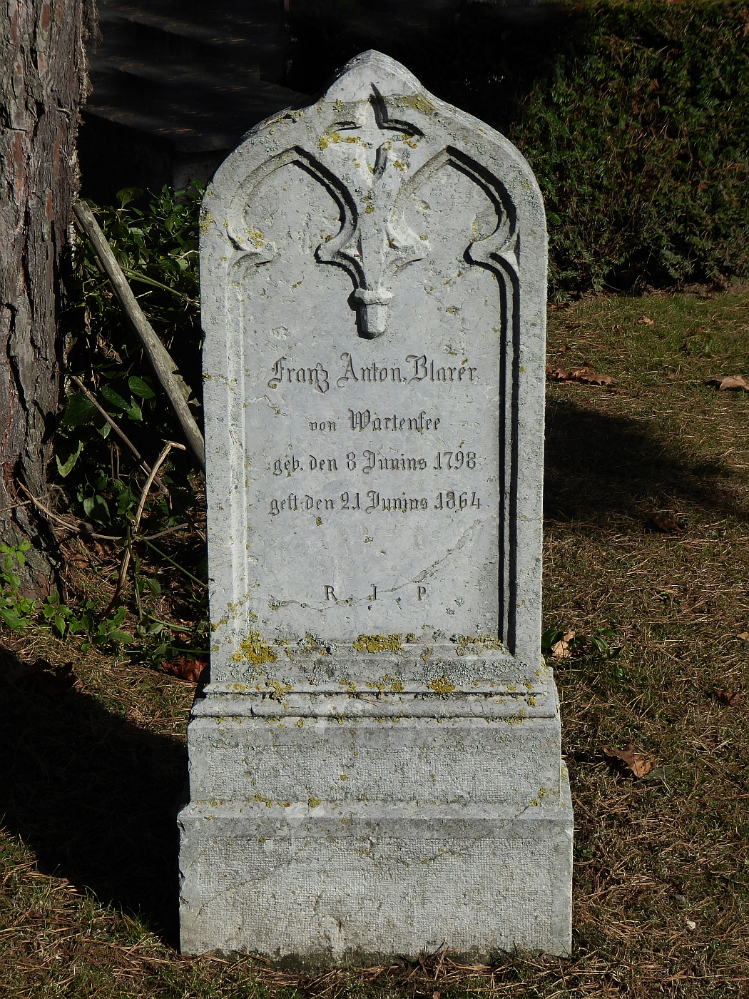 Franz Anton Blarer von Wartensee (1798–1864) Anwalt, Regimentsauditor, Posthalter, Gutsherr . Grab auf dem Friedhof von Aesch, Basel-Land, Schweiz